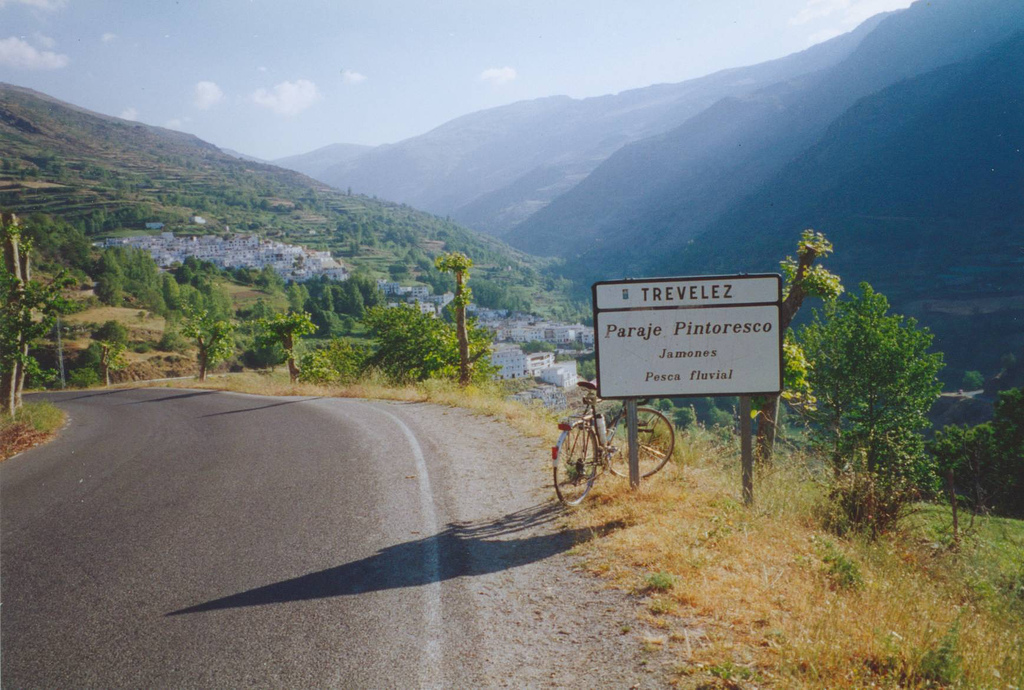 Entrada y vista general de la localidad de Trevélez (Granada-España)